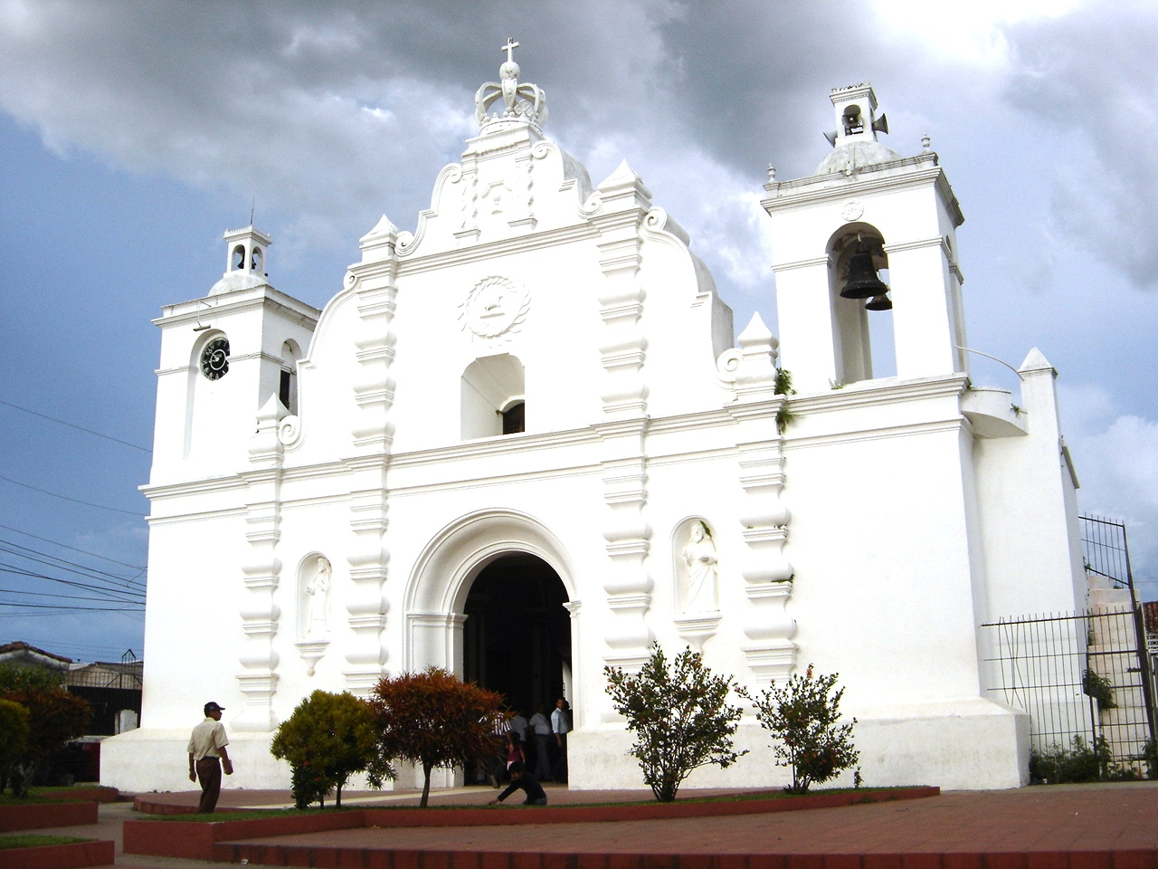 Detalles de la fachada de la Iglesia Parroquial de San Juan Evangelista